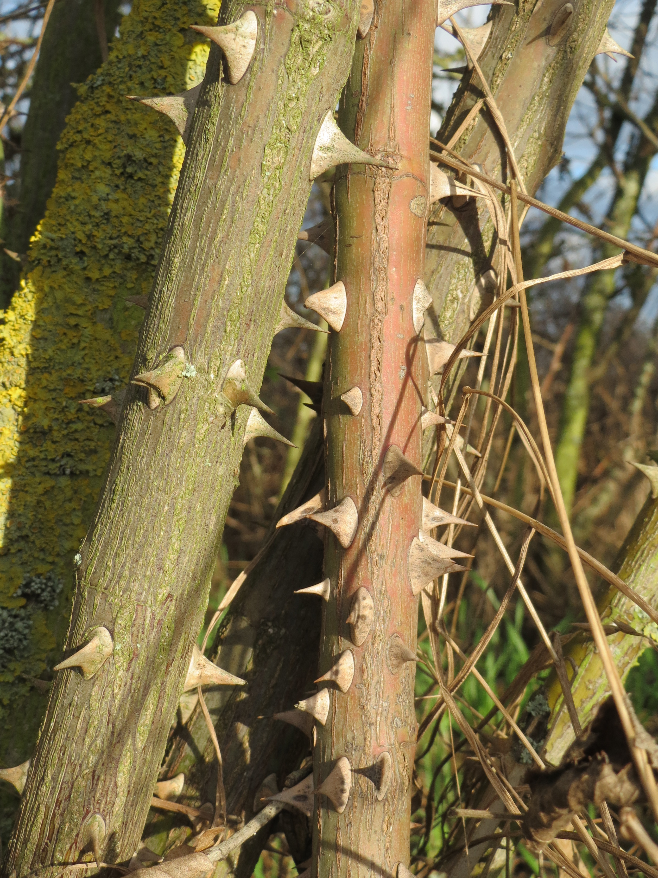 Dornen der Hunds-Rose (Rosa canina) bei Reilingen